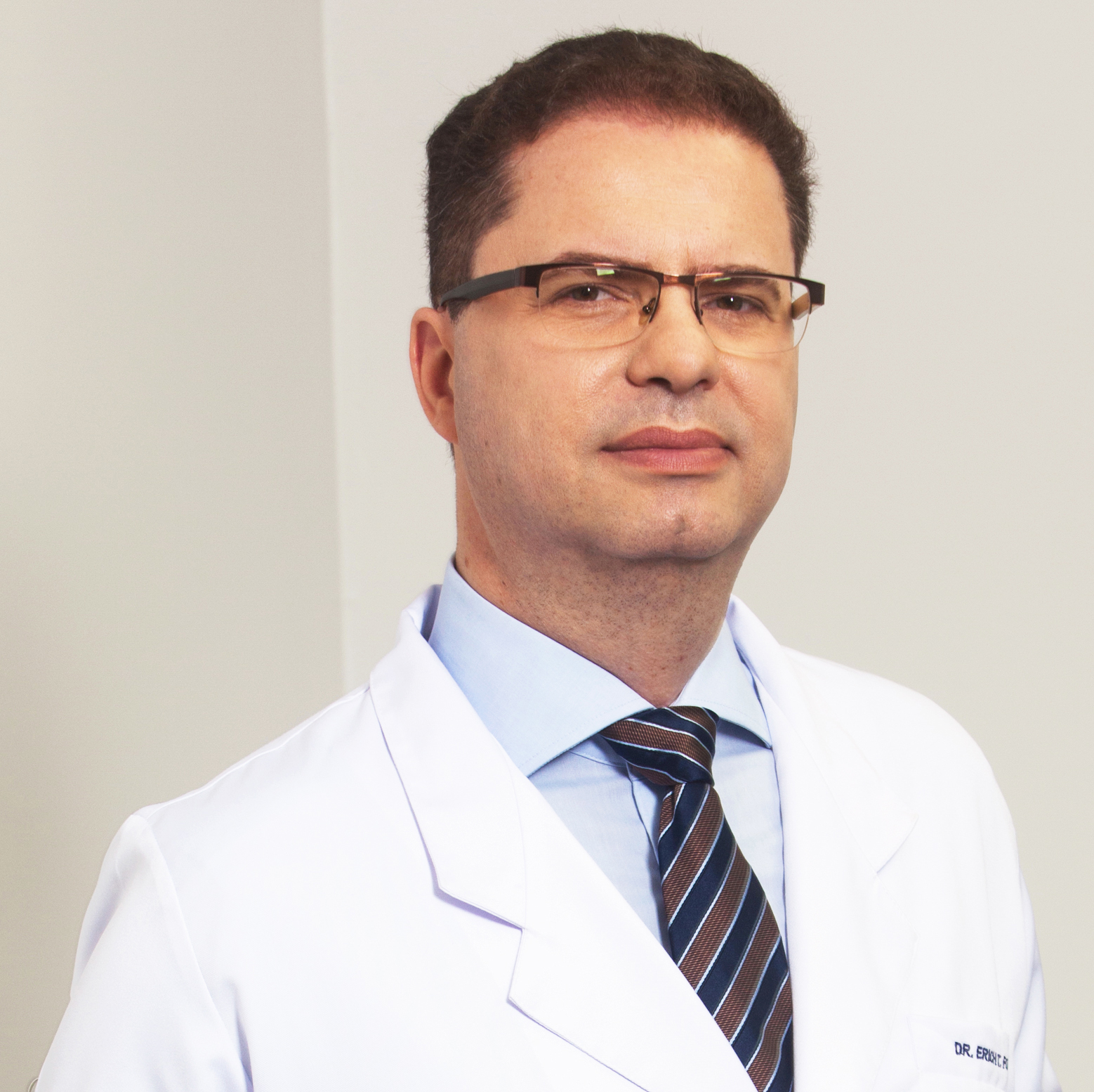 Dr. Erich Fonoff em seu consultório em março de 2017